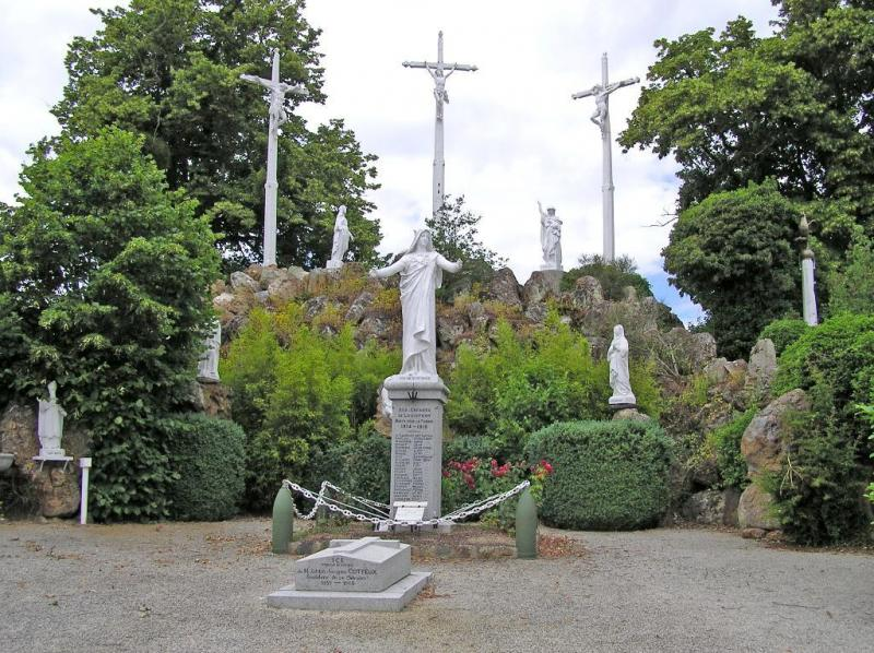 Le calvaire